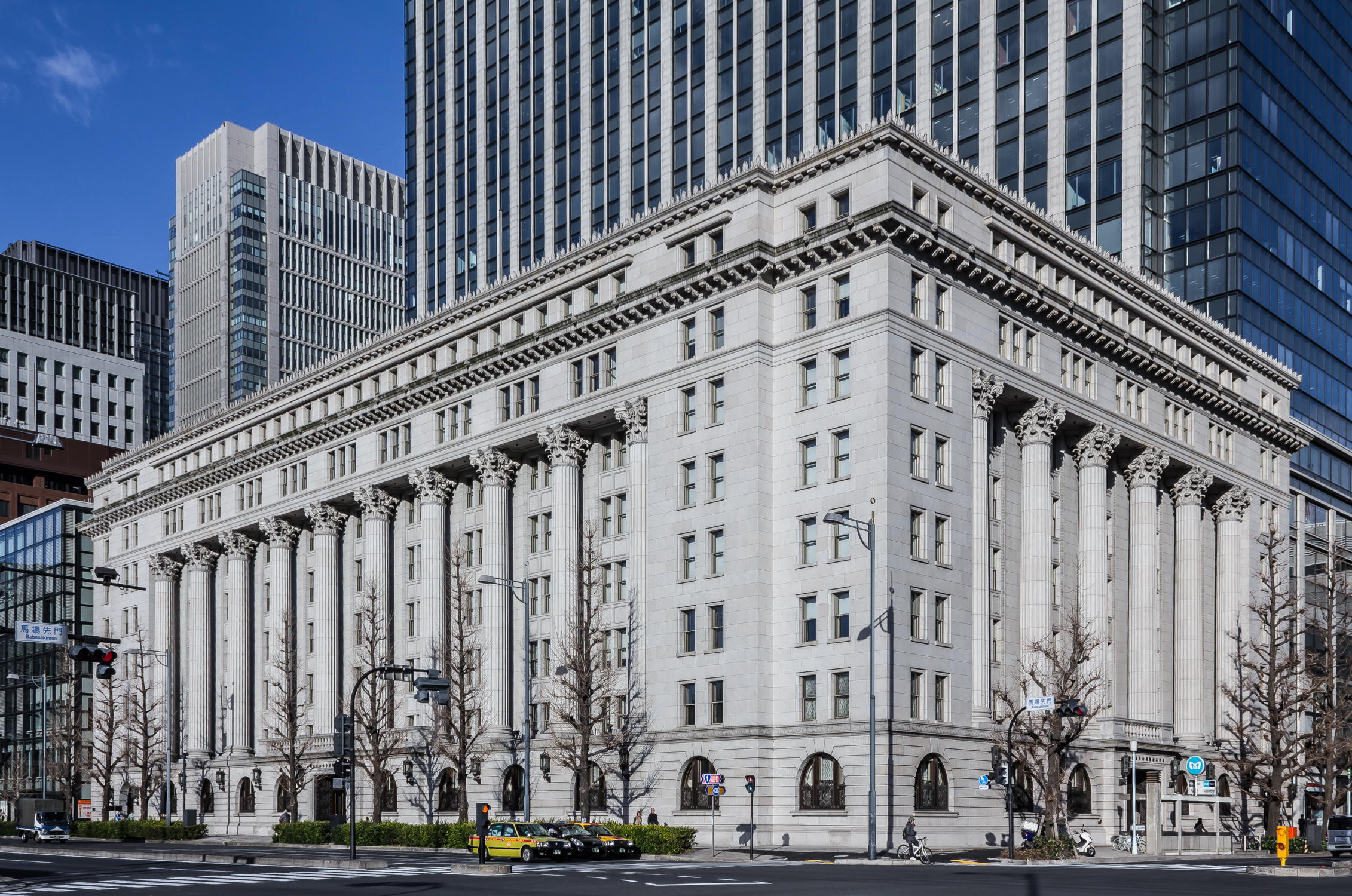 明治生命館（重要文化財）。明治安田生命本社ビル。東京都千代田区